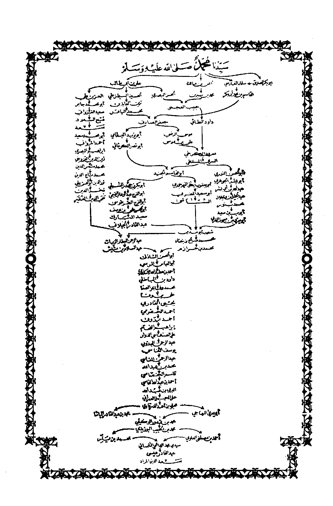 سند المشايخ الشاذليه